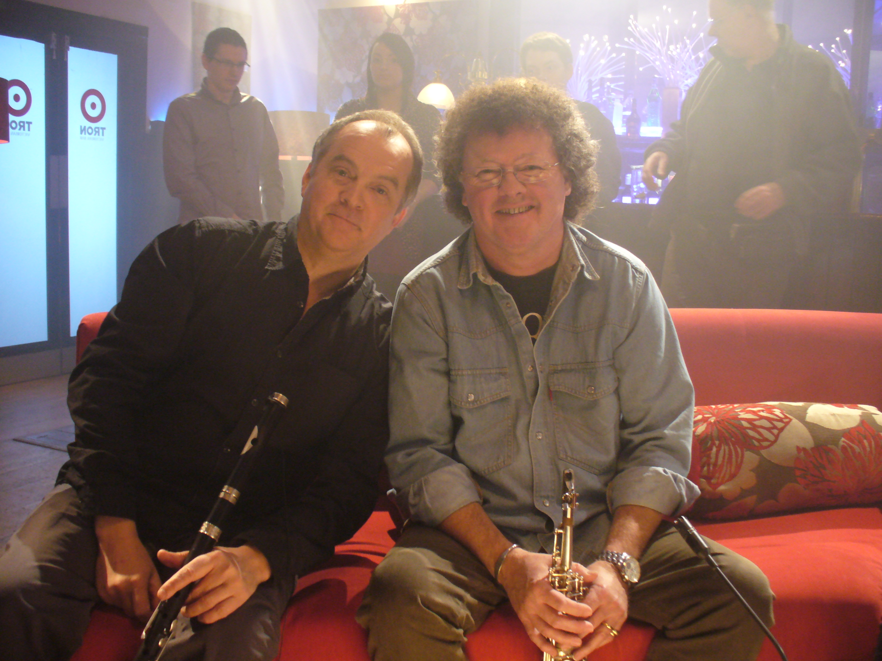 Jean-Michel Veillon and Bernard Le Dreaux lors de l'enregistrement d'une émission sur la chaine de télévision écossaise BBC Alba pour "Empreintes" de Gilles Le Bigot en 2012.